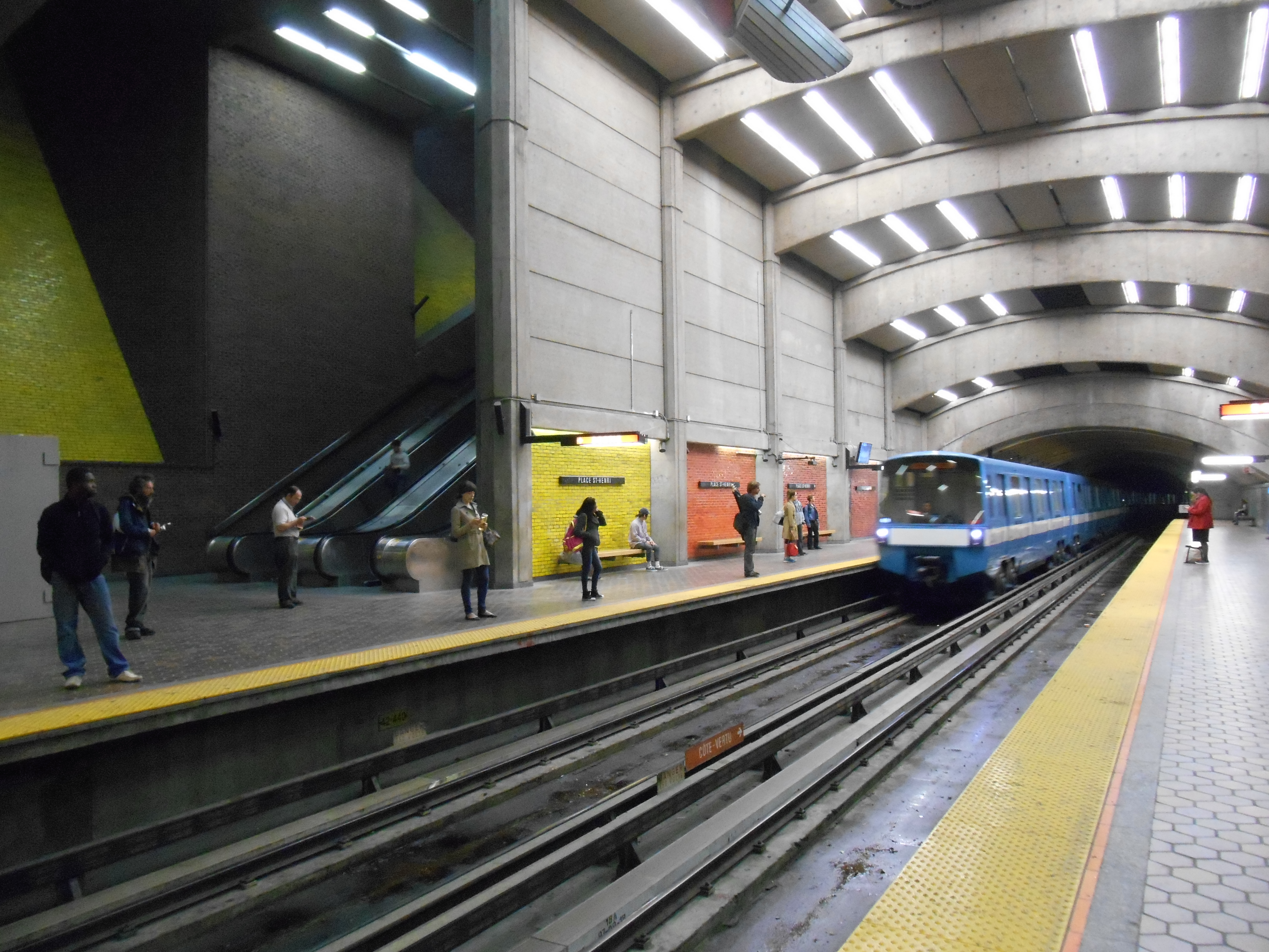 Station de métro Place-Saint-Henri, Montréal